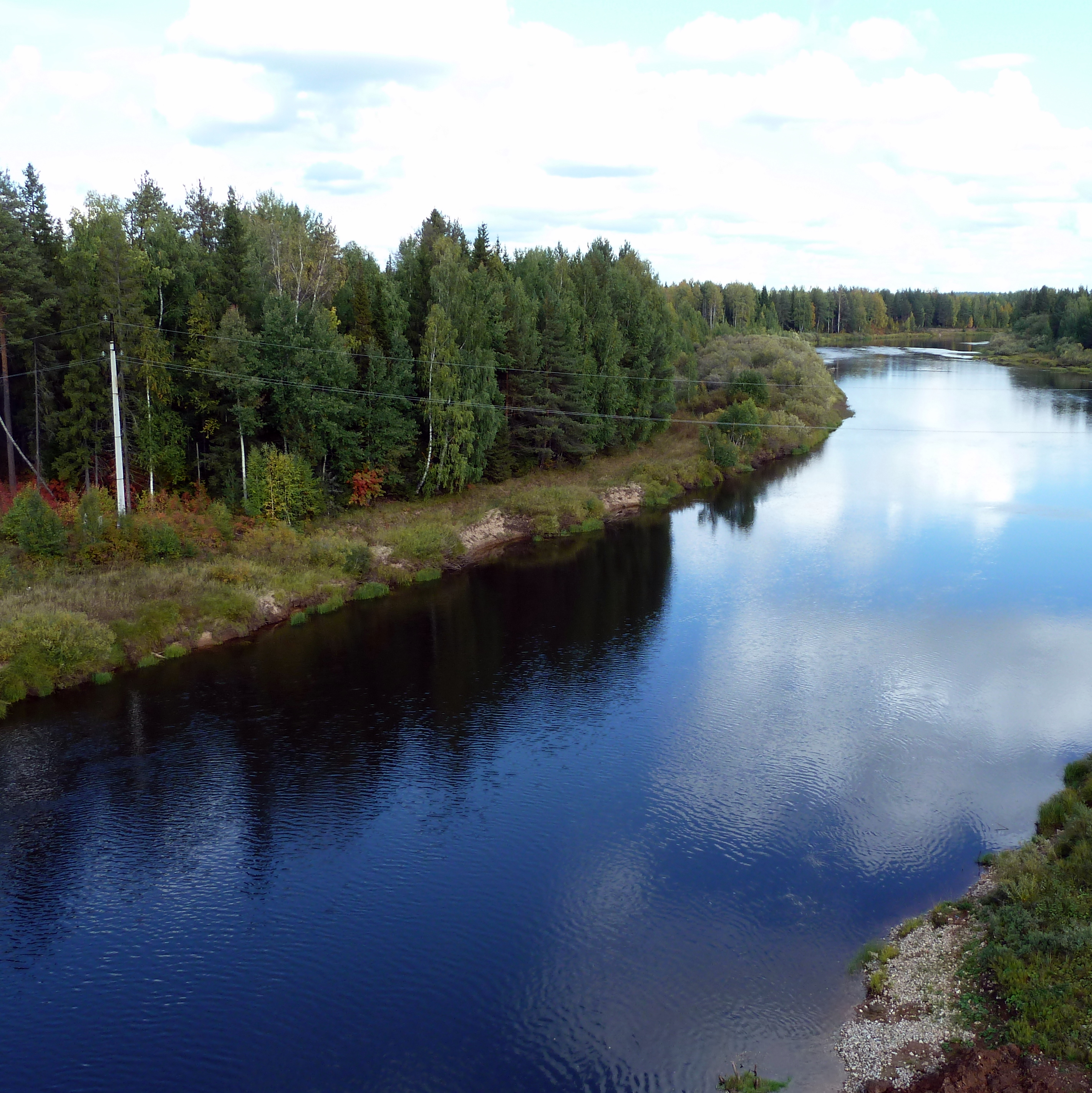 Река Весляна возле села Давыдово. Гайнский район, Пермский край